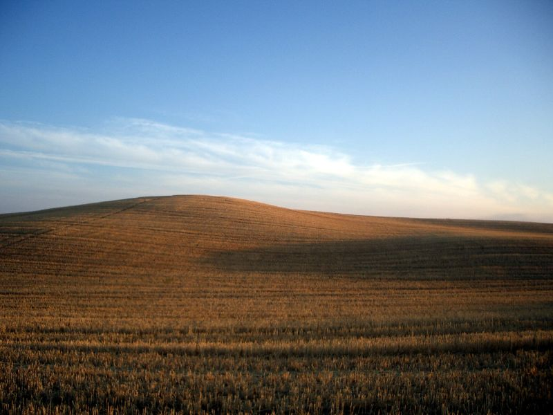 la meseta cerca de Terradillos de los Templarios